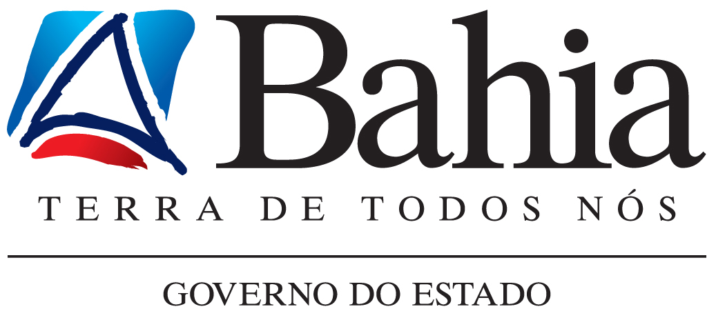 Logomarca do segundo mandato de Jaques Wagner como governador estadual da Bahia (2011-2014). Marca do Governo da Bahia Terra de Todos Nós Baixe a marca do Governo da Bahia e das secretarias de Estado em diferentes formatos no endereço